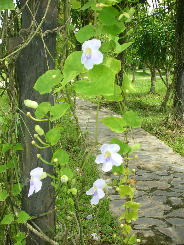 Hình do tôi chụp. Miêu tả cây Bông báo còn gọi là dây bông xanh, đại hoa lão nha chủy, madia (Mèo).